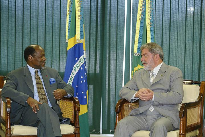 Brasília - Presidente Luiz Inácio Lula da Silva conversa com o presidente de Moçambique, Joaquim Chissano, durante encontro no Palácio do Planalto,(Ricardo Stuckert/PR)